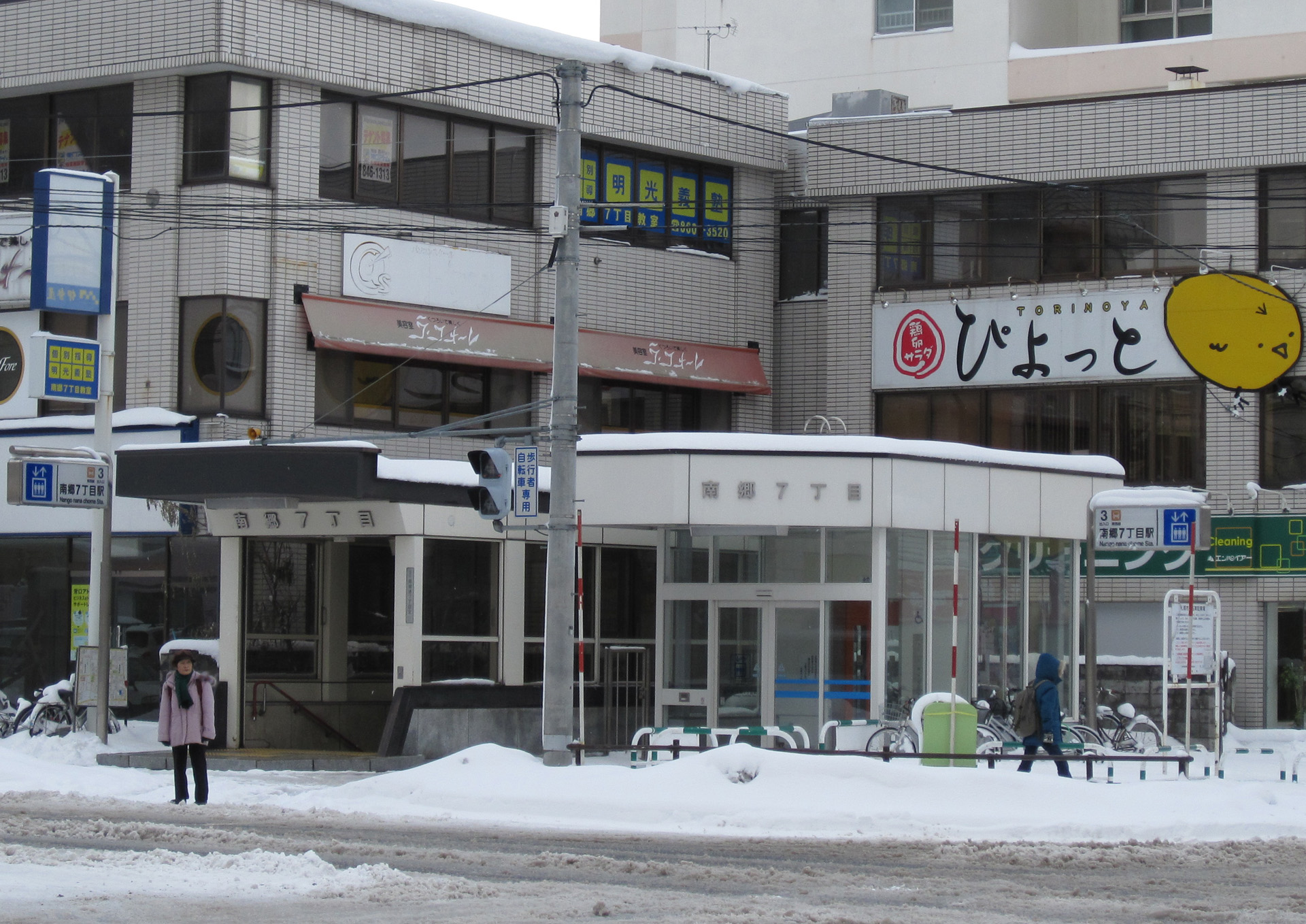 南郷7丁目駅3番出入口とエレベーター